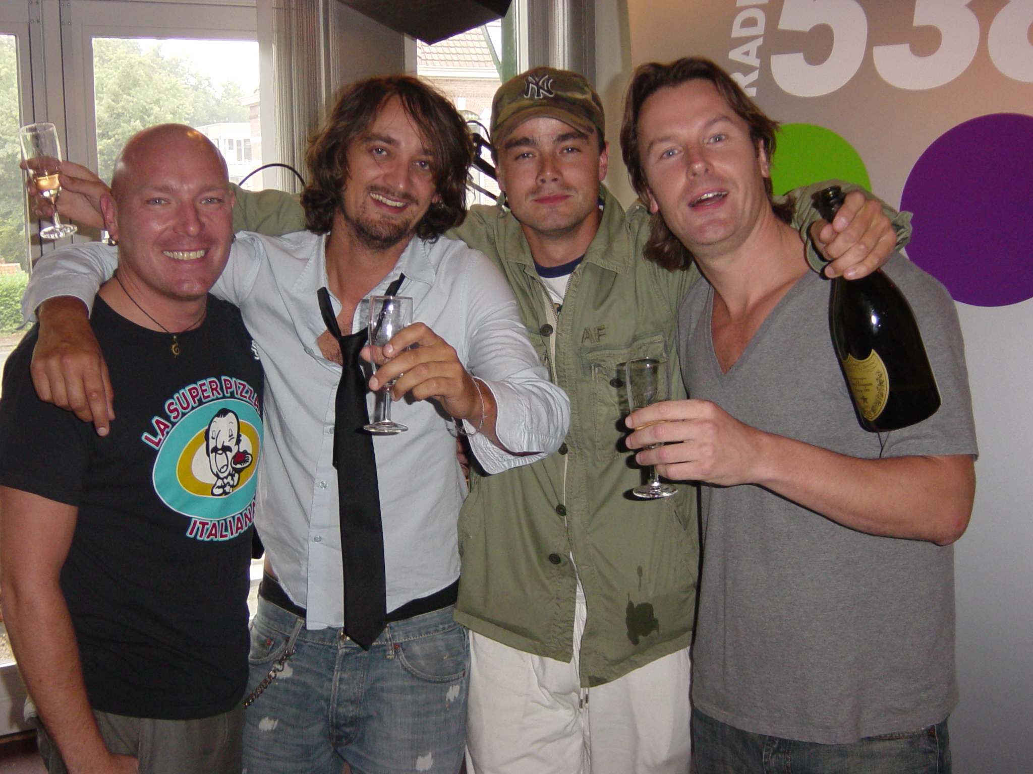 Nummer 1 positie in de Top 40 voor Kane, dus de champagne ging open